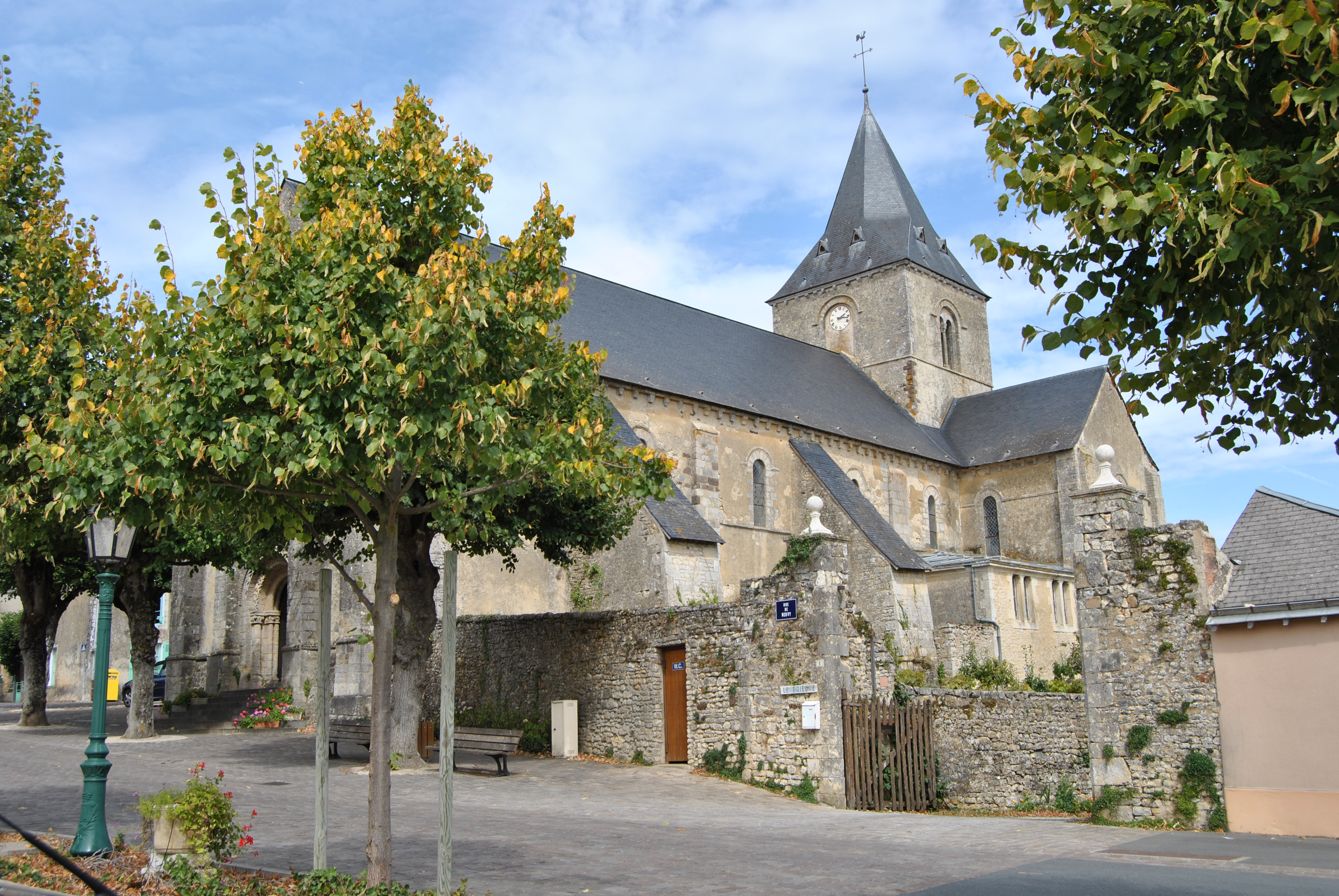 Eglise de Tennie (France, Pays de la Loire)